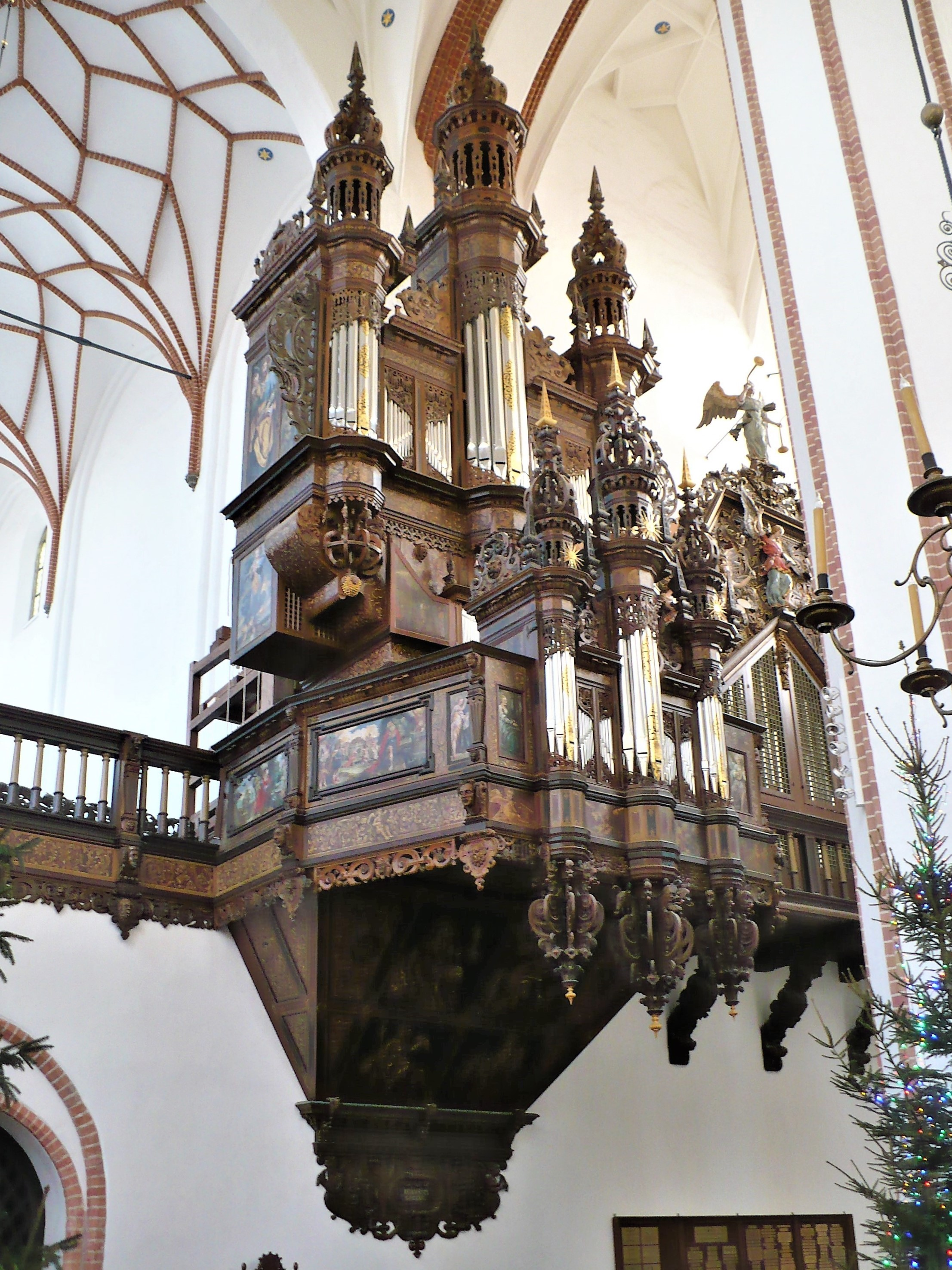 Wnętrze kościoła Św.Trójcy w Gdańsku-organy